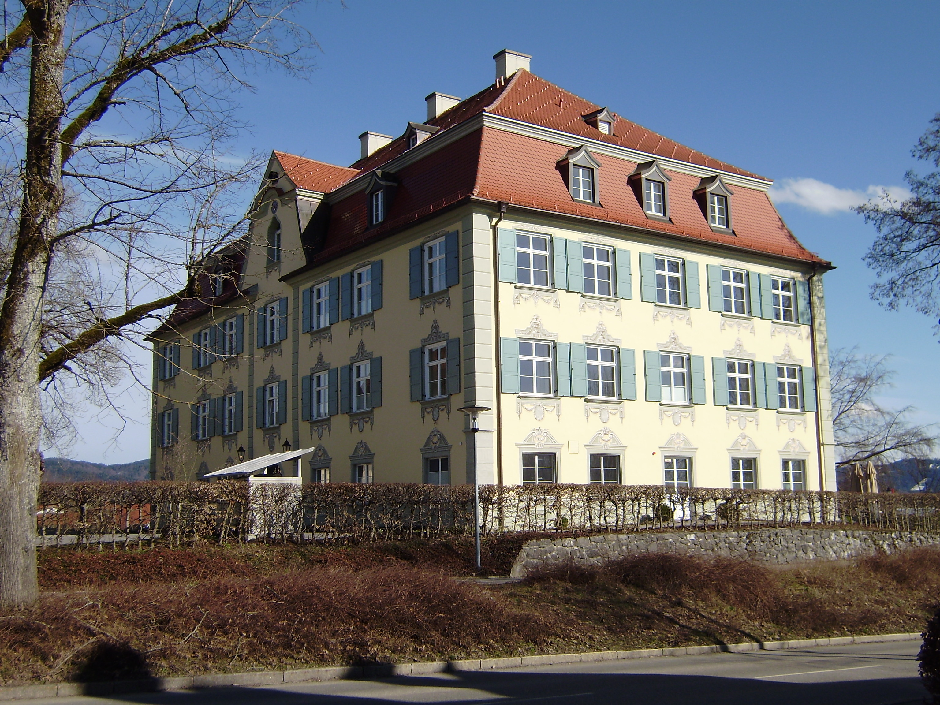 Schloss Neutrauchburg bei Isny von Nordwesten